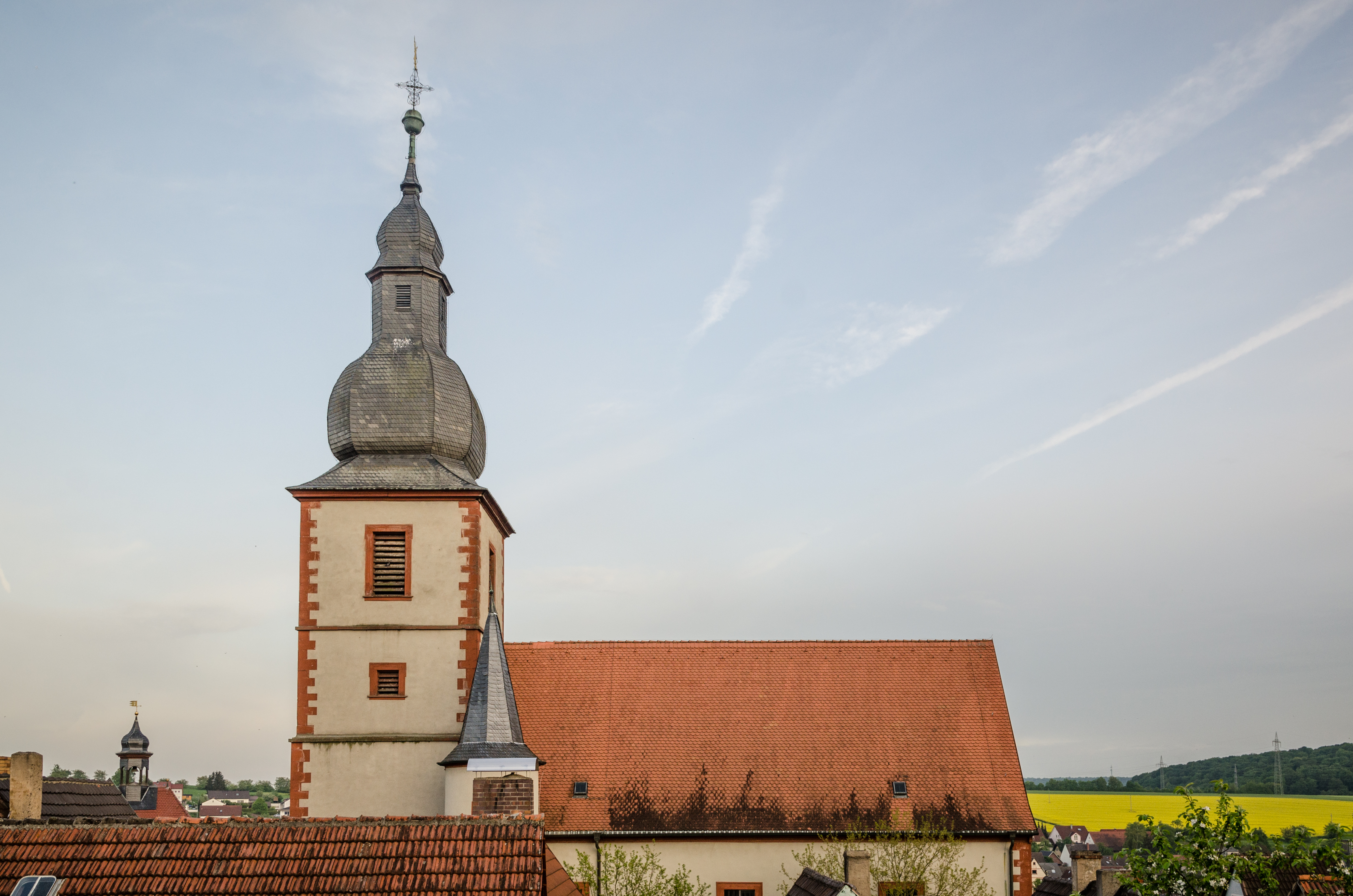 Remlingen, St. Andreas